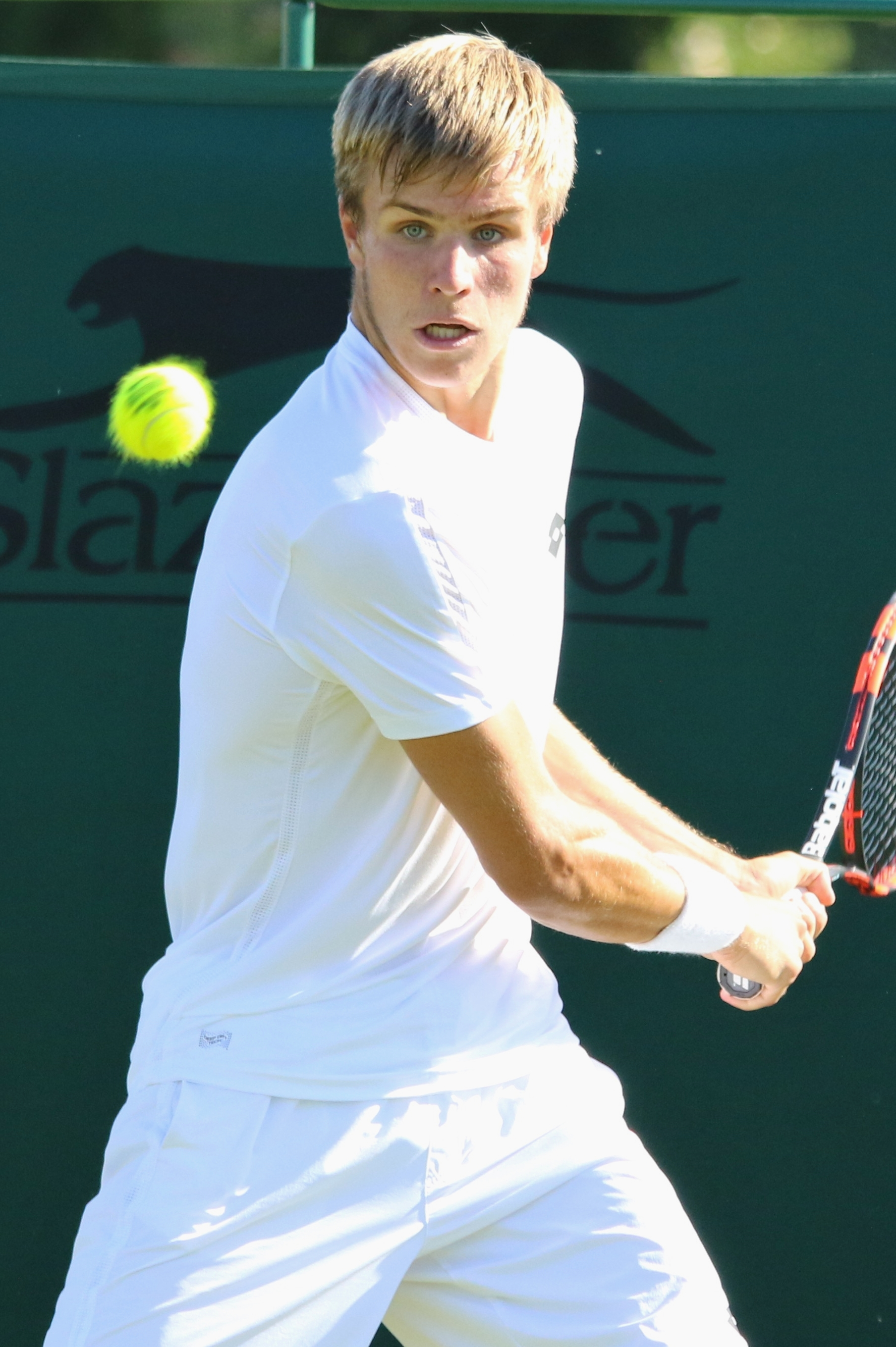 Popko WMQ16 (33)